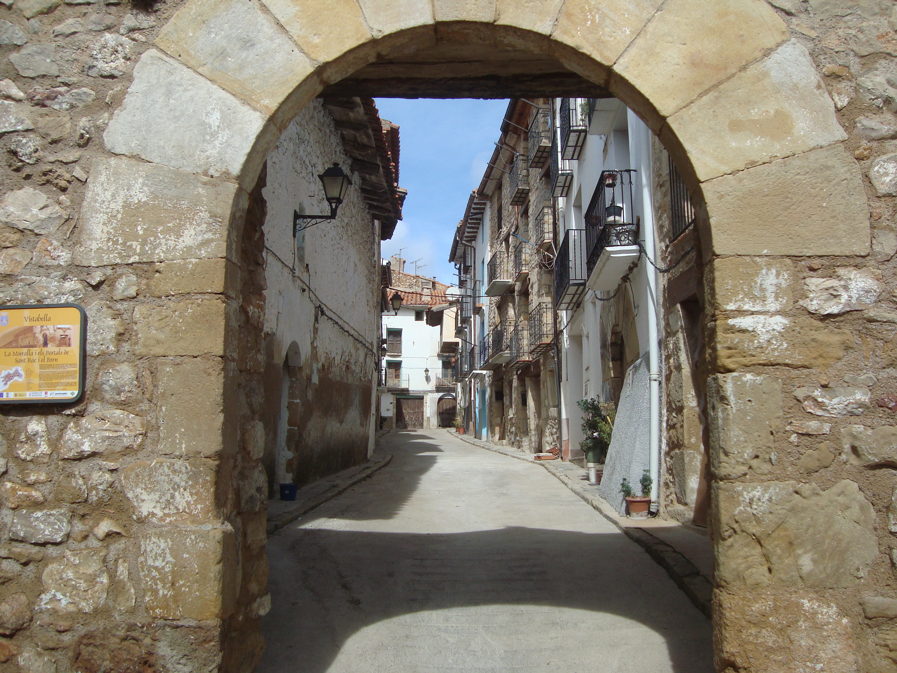 Castell i muralles de Vistabella del Maestrat